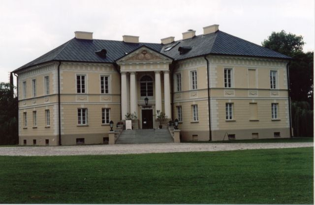 Muzeum: Zespół Pałacowo Parkowy w Dobrzycy, woj. wielkopolskie, powiat pleszewski, gmina Dobrzyca, elewacja frontowa